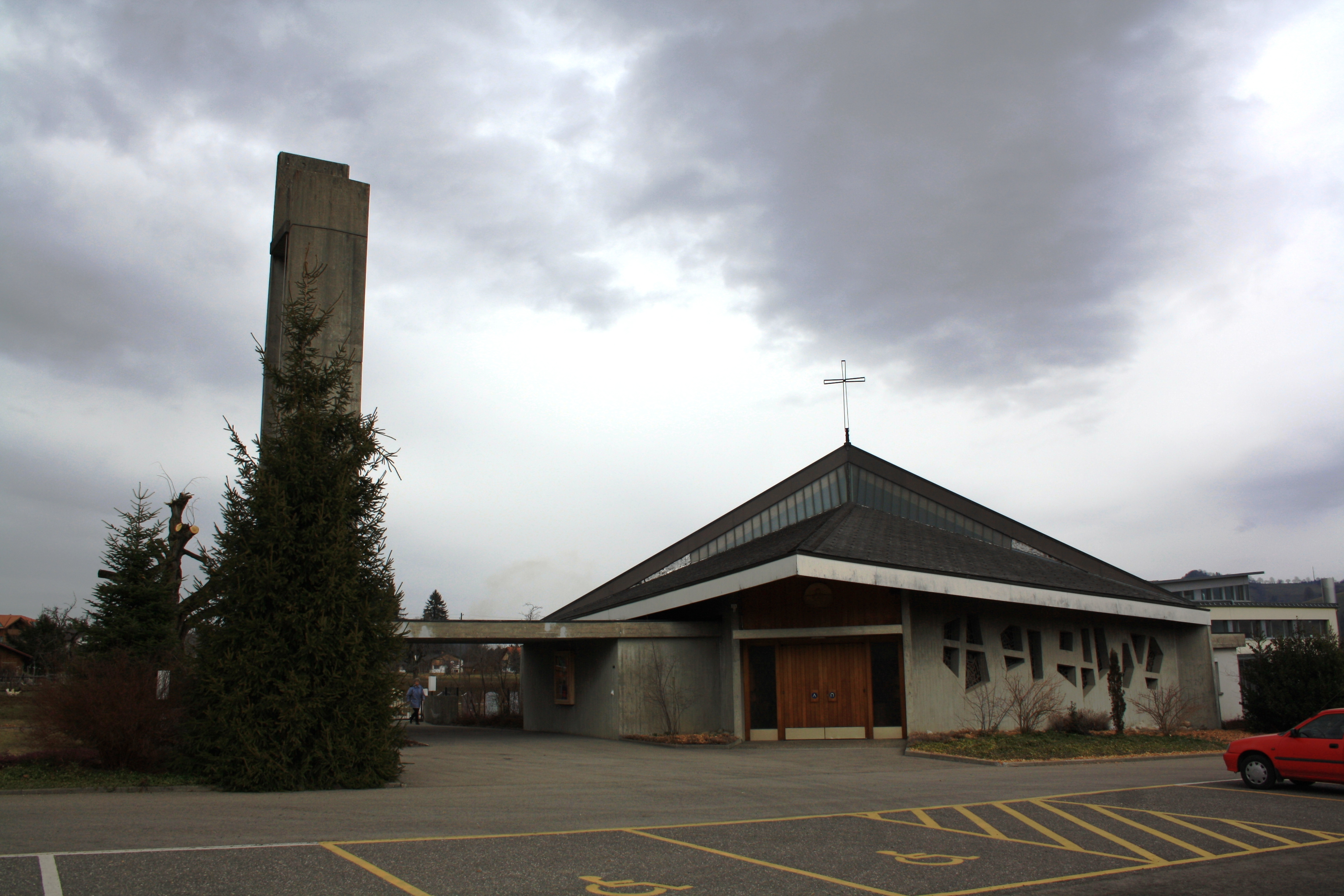 Röm.-kath. Kirche Brünisried, Kanton Freiburg, Schweiz